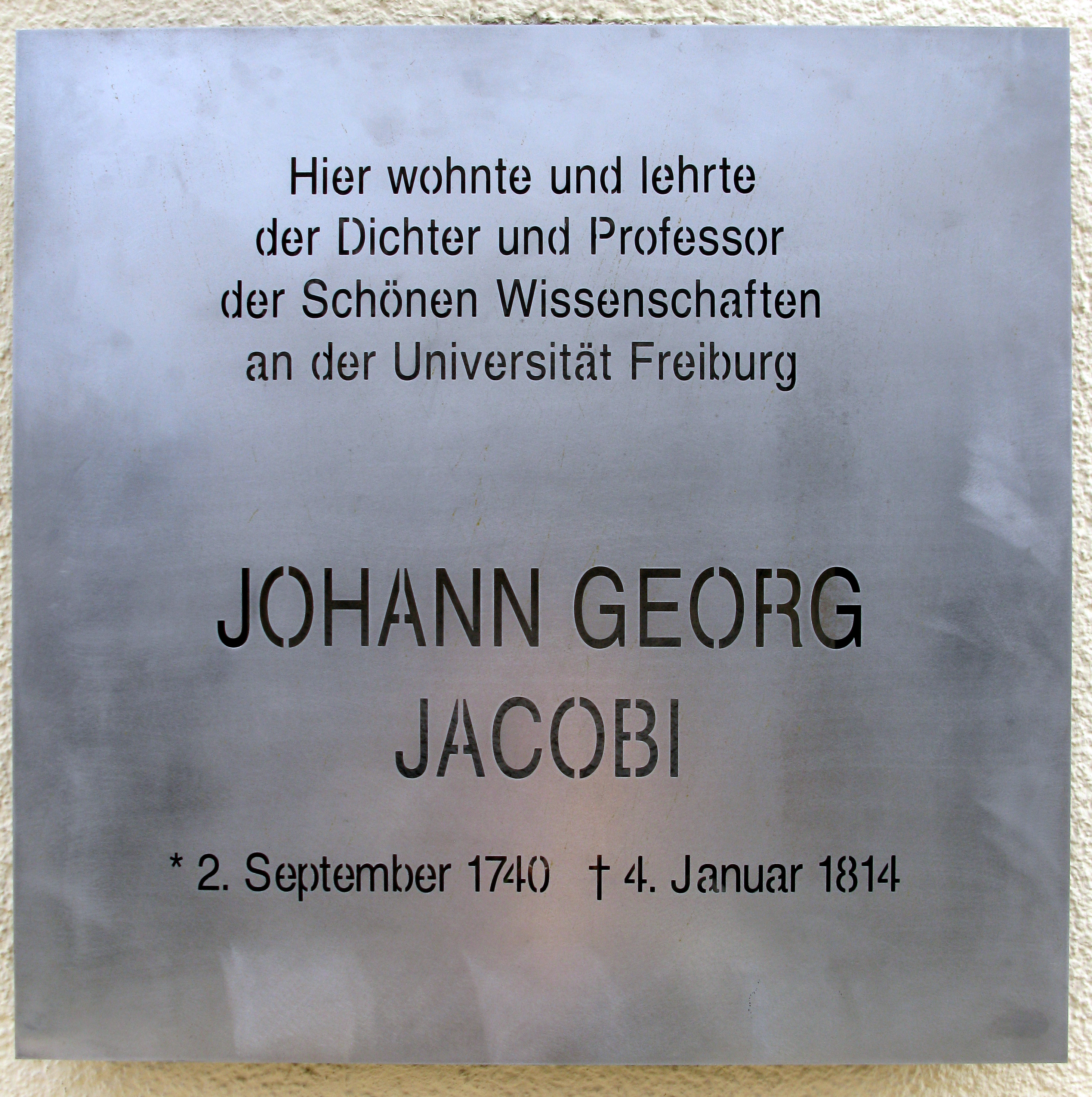 Johann Georg Jacobi, Gedenktafel an seinem Freiburger Wohnhaus